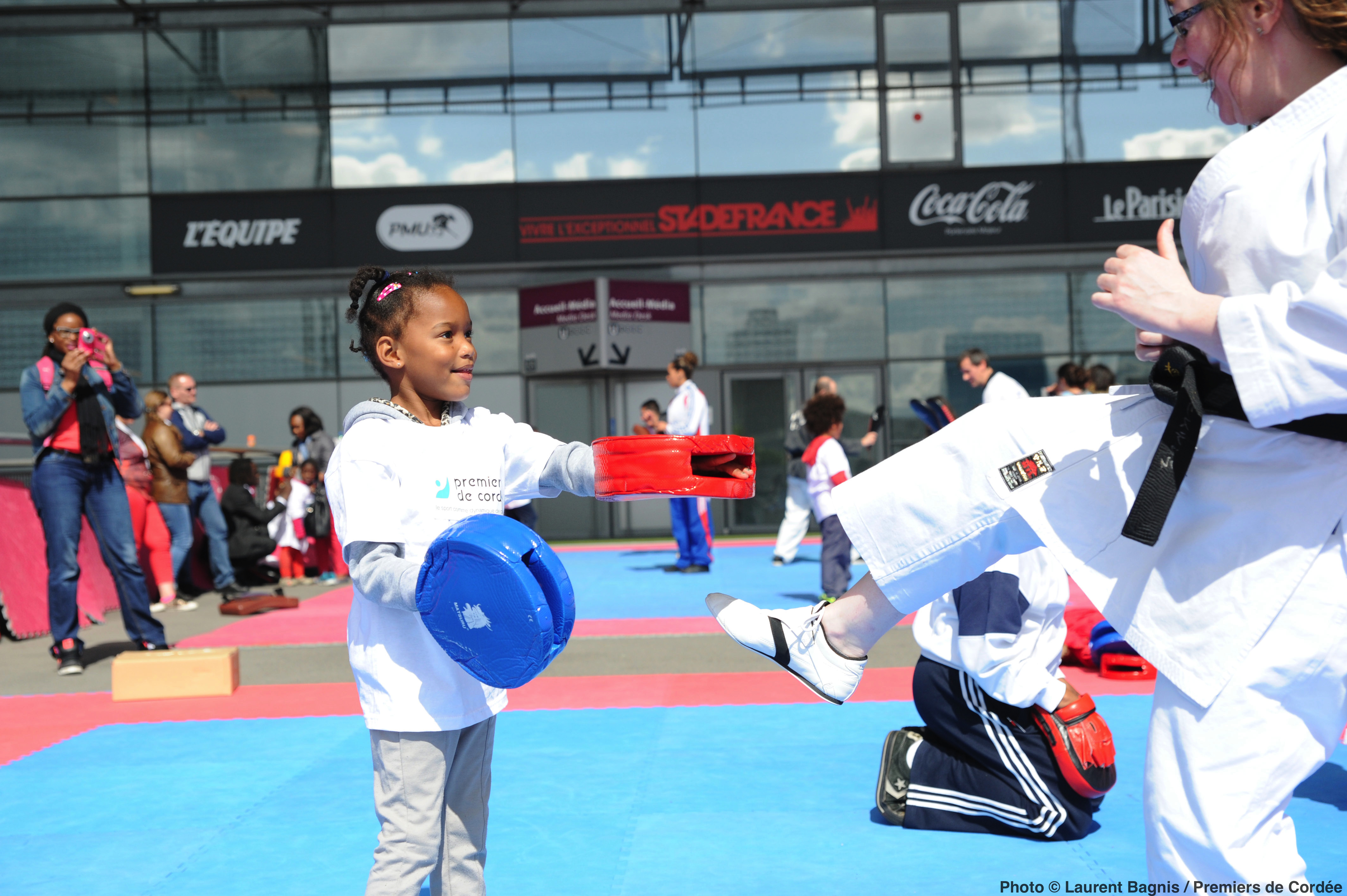 Journée Evasion 2015.